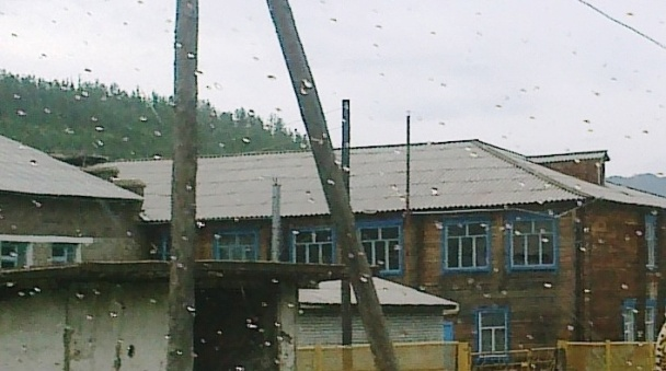 Спортзал в улусе